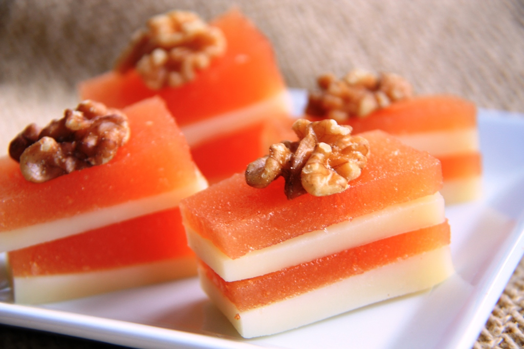 Dulce de membrillo, queso de Irati y nuecesEuskara: Irasagar-gozokia, Iratiko gazta eta intxaurrak